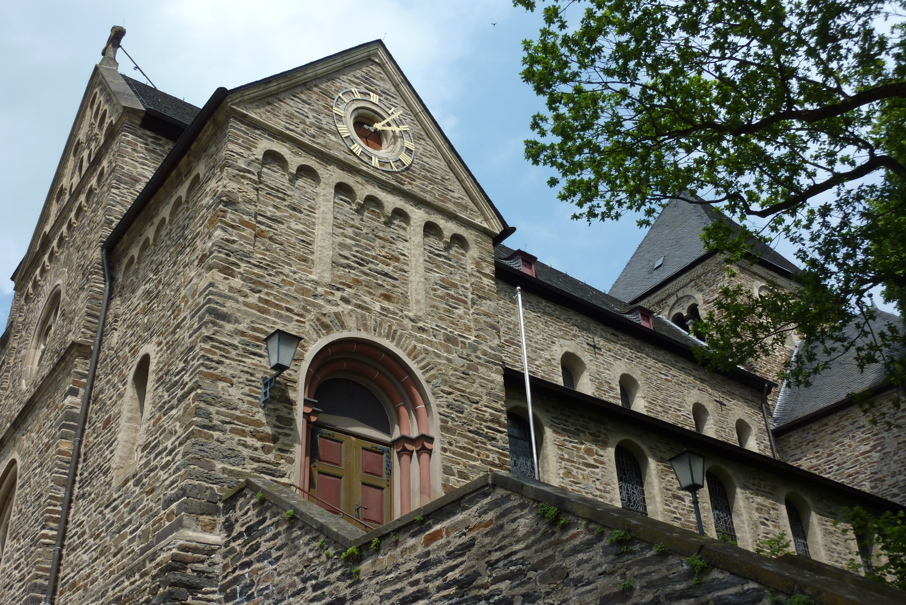 katholische Pfarrkirche Mariä Verkündigung in Altenahr, Ansicht von Südwesten